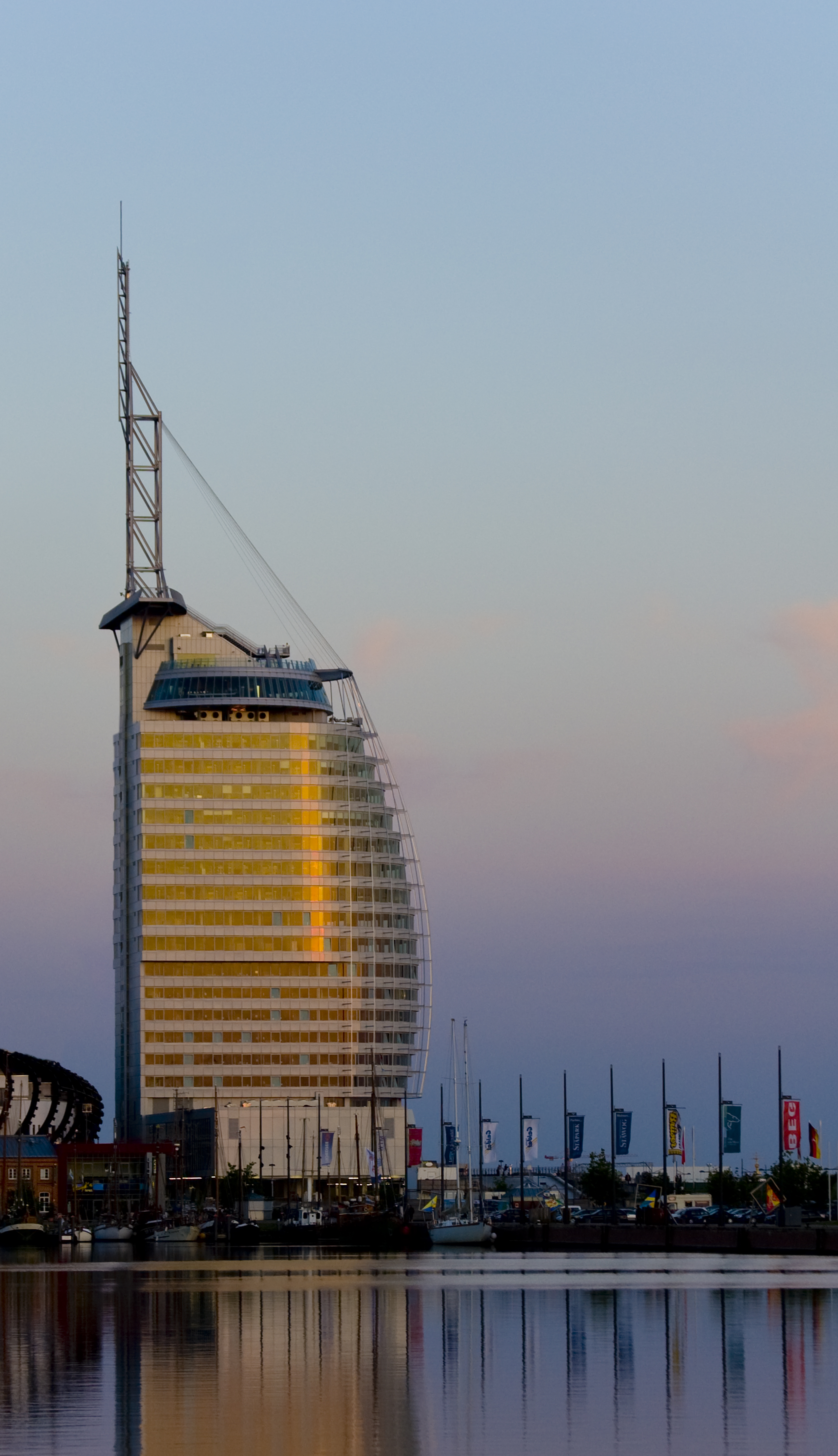 "ATLANTIC Hotel SAIL City" in Bremerhaven, am Abend aufgenommen